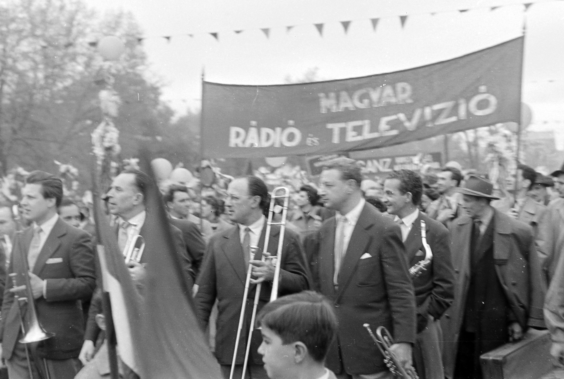 Felvonulási tér, május 1-i felvonulás, előtérben a Magyar Rádió Tánczenekara zenészei, trombitával Zsoldos Imre. Location: Hungary, Budapest Tags: 1st of May parade, march, Hungarian Radio Title: Felvonulási tér, május 1-i felvonulás, előtérben a Magyar Rádió Tánczenekara zenészei, trombitával Zsoldos Imre.